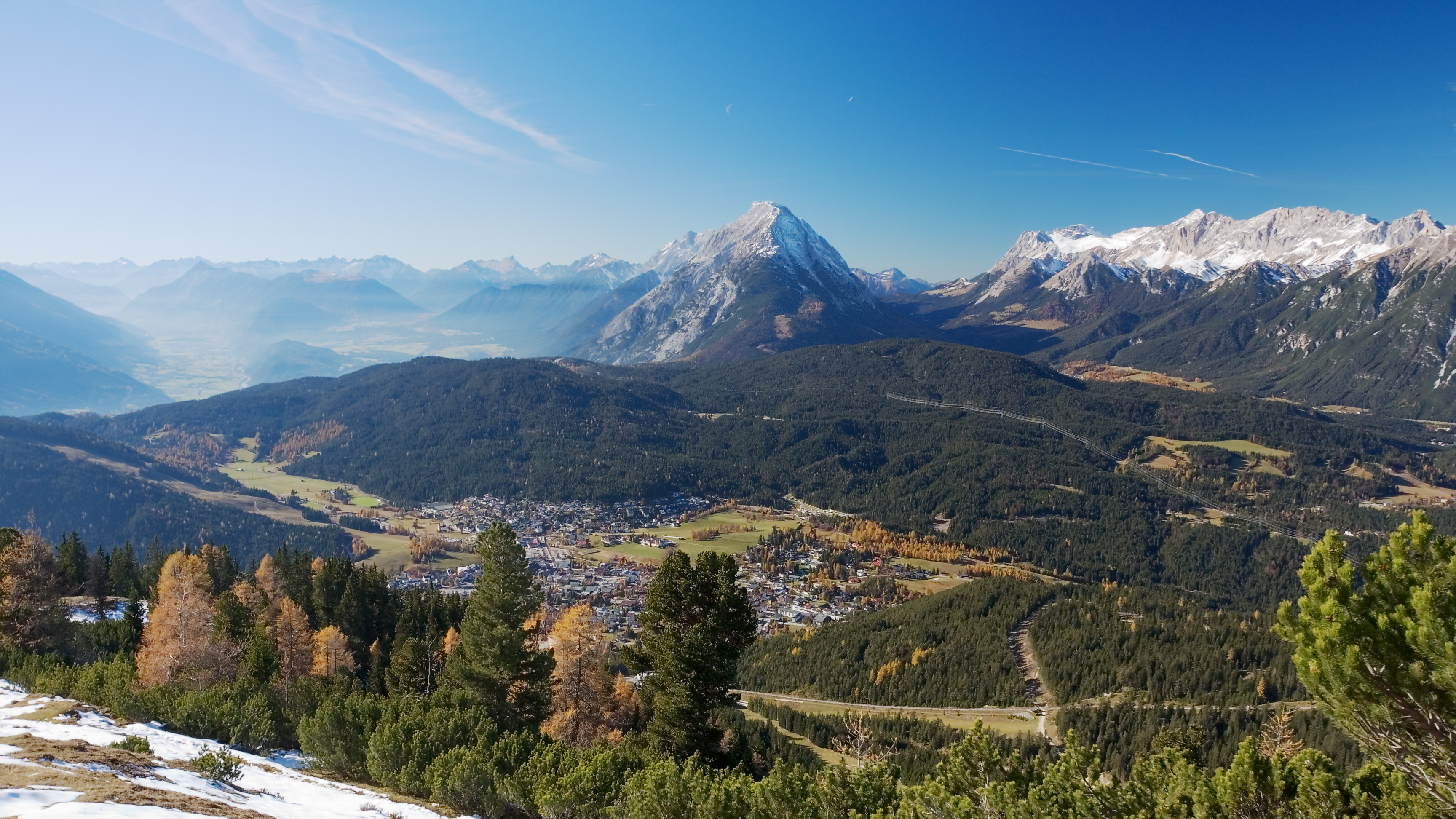 Ein Blick vom Hermelekopf auf Seefeld, Tirol, ÖsterreichIm Hintergrund links das InntalDas Dorf ist von viel Wald umgeben.